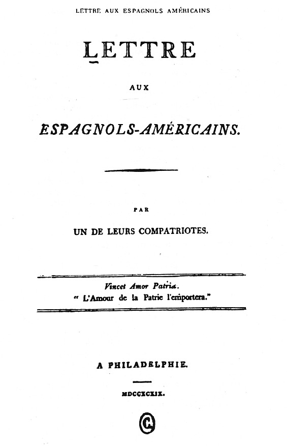 Portada de la primera edición de “Carta a los españoles americanos” de Juan Pablo Viscardo y Guzmán. Escrita originalmente en idioma francés, –con el título original de Lettre aux espagnols americains– fue editada por primera vez en 1799.